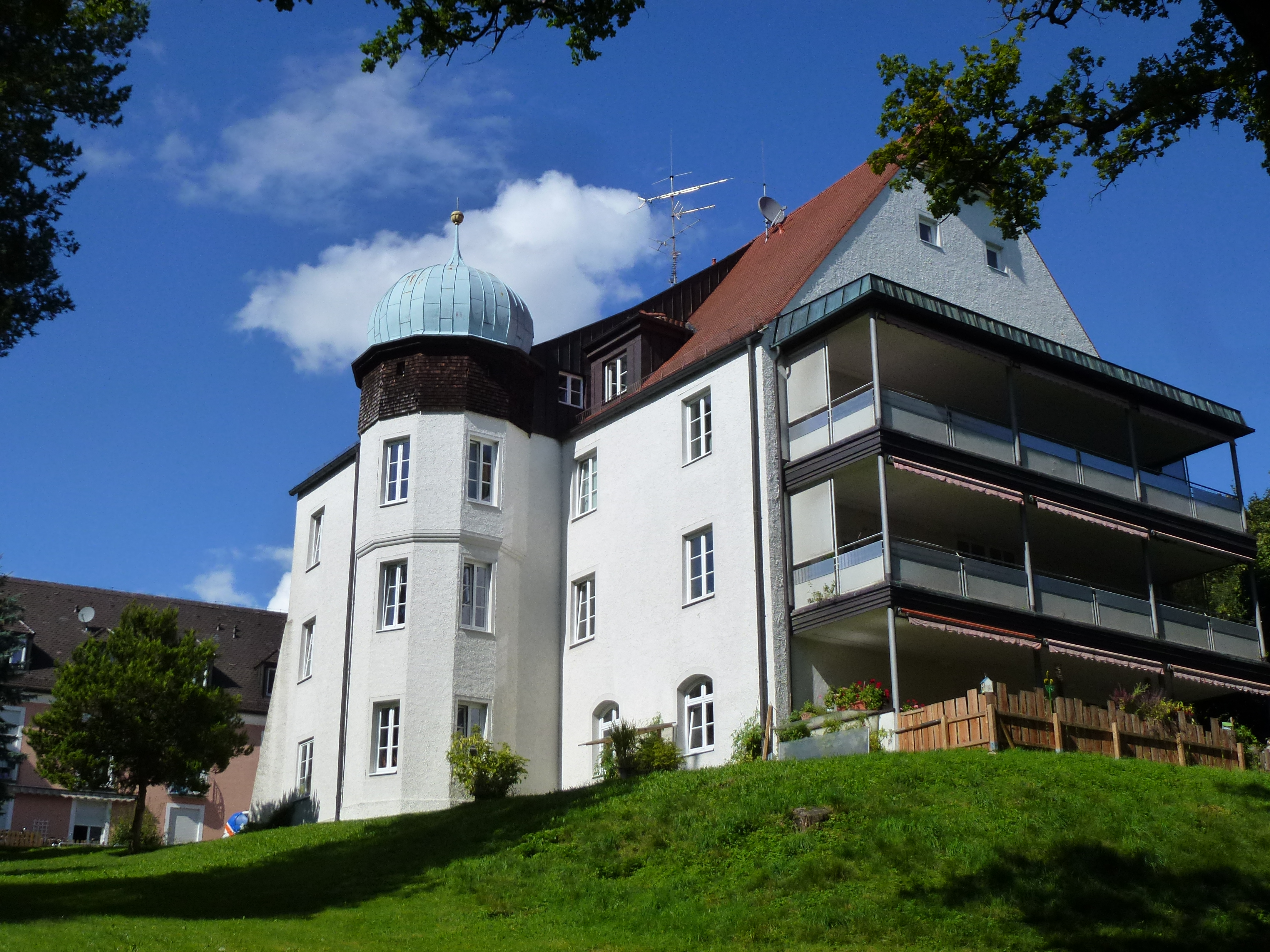 Deutenhofen, Von-Mandl-Str. 25: Ehemaliges Hofmarkschloß. Ansicht von Süden